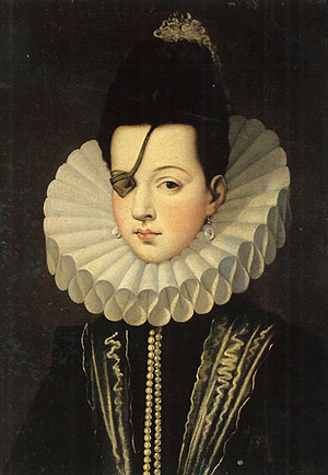 La princesa de Éboli According to the book ("Spanish Fashion at the Courts of Early Modern Europe; ed. by Jose Luis Colomer v. I, Madrid 2014, page 55) it is the fake. "An example of how the costume depicted in a portrait can reveal a forgery is the often reproduced portrait of the Princess of Eboli, which some autors such as Camon Aznar have even attributed to Sanchez Coello. The forger drew inspiration from portraits of the period, but converted the ends of toca de cabos into a separate garment that only covers the shoulders. In addition to this anomaly - no such garment existed - neither the high hairstyle nor the large collar worn by the sitter had yet appeared when this princess died, or indeed by the the time Sanchez Coello died".